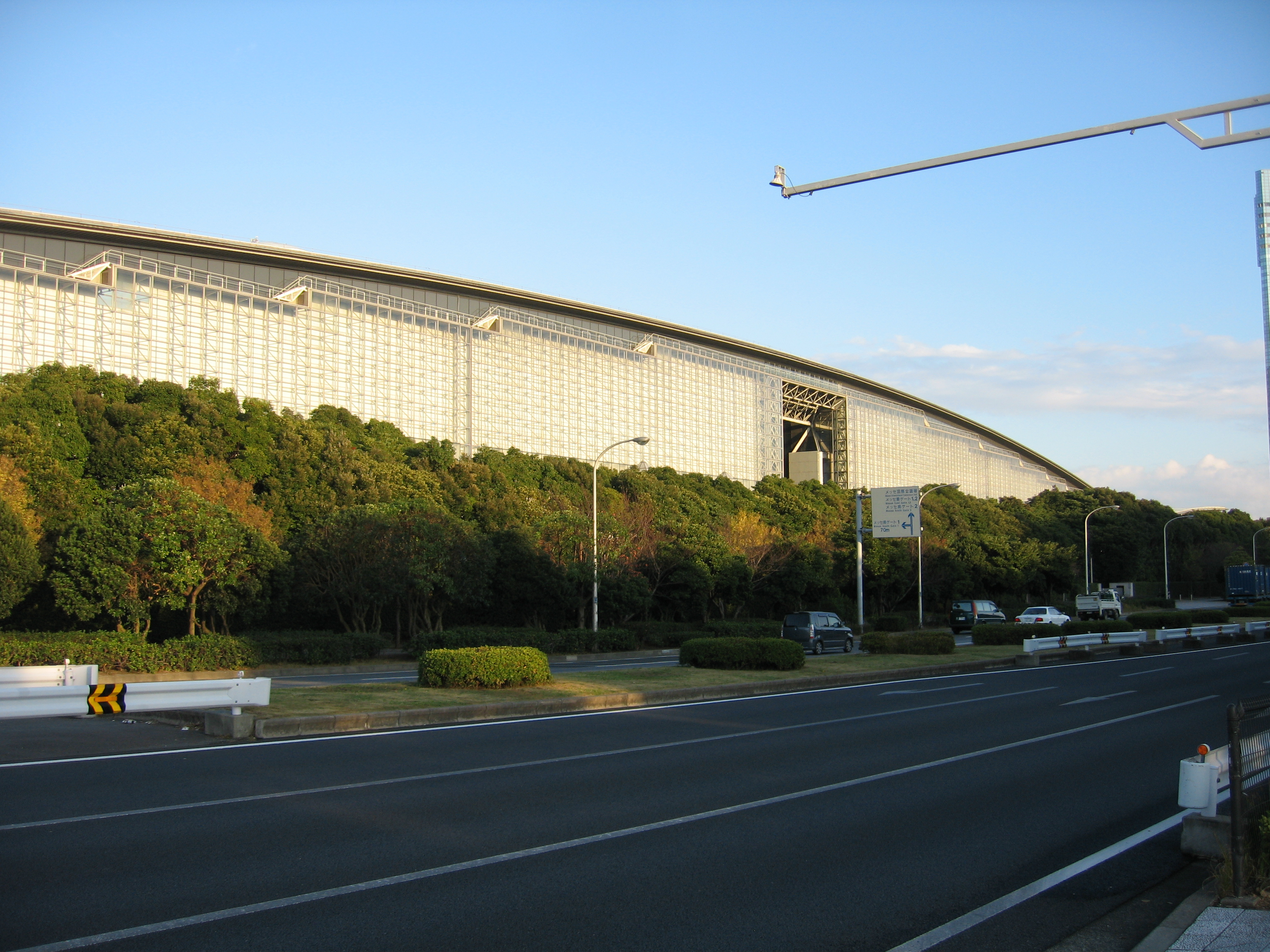 Makuhari Messe in Chiba, Japan